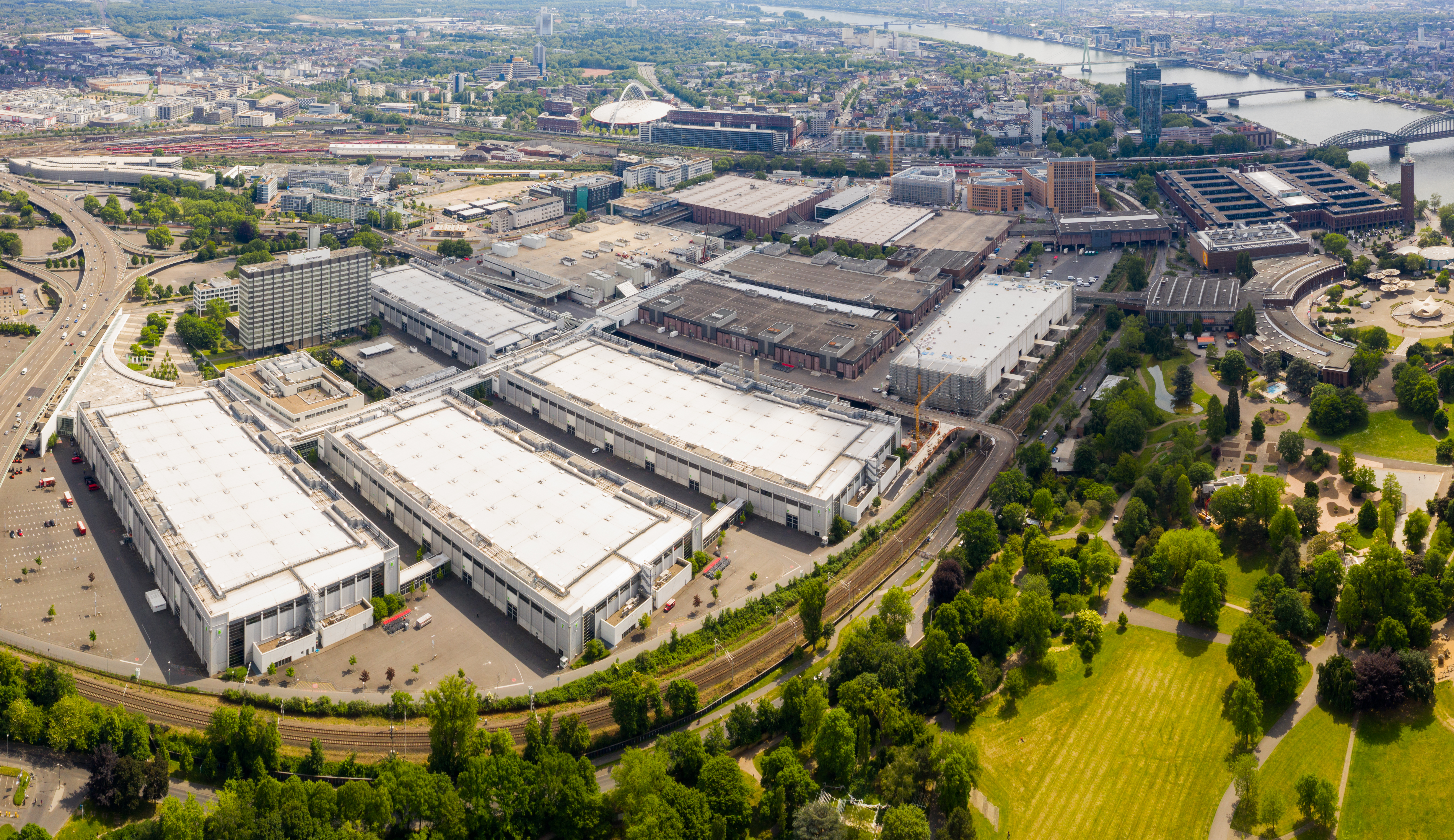 Messehallen der Koelnmesse - Luftaufnahme. Flughöhe: 300 m mit Genehmigung der Bezirksregierung Köln und Freigabe durch die Deutsche Flugsicherung Köln. Standort der Drohne: Über dem Rheinpark mit Genehmigung der Stadt Köln